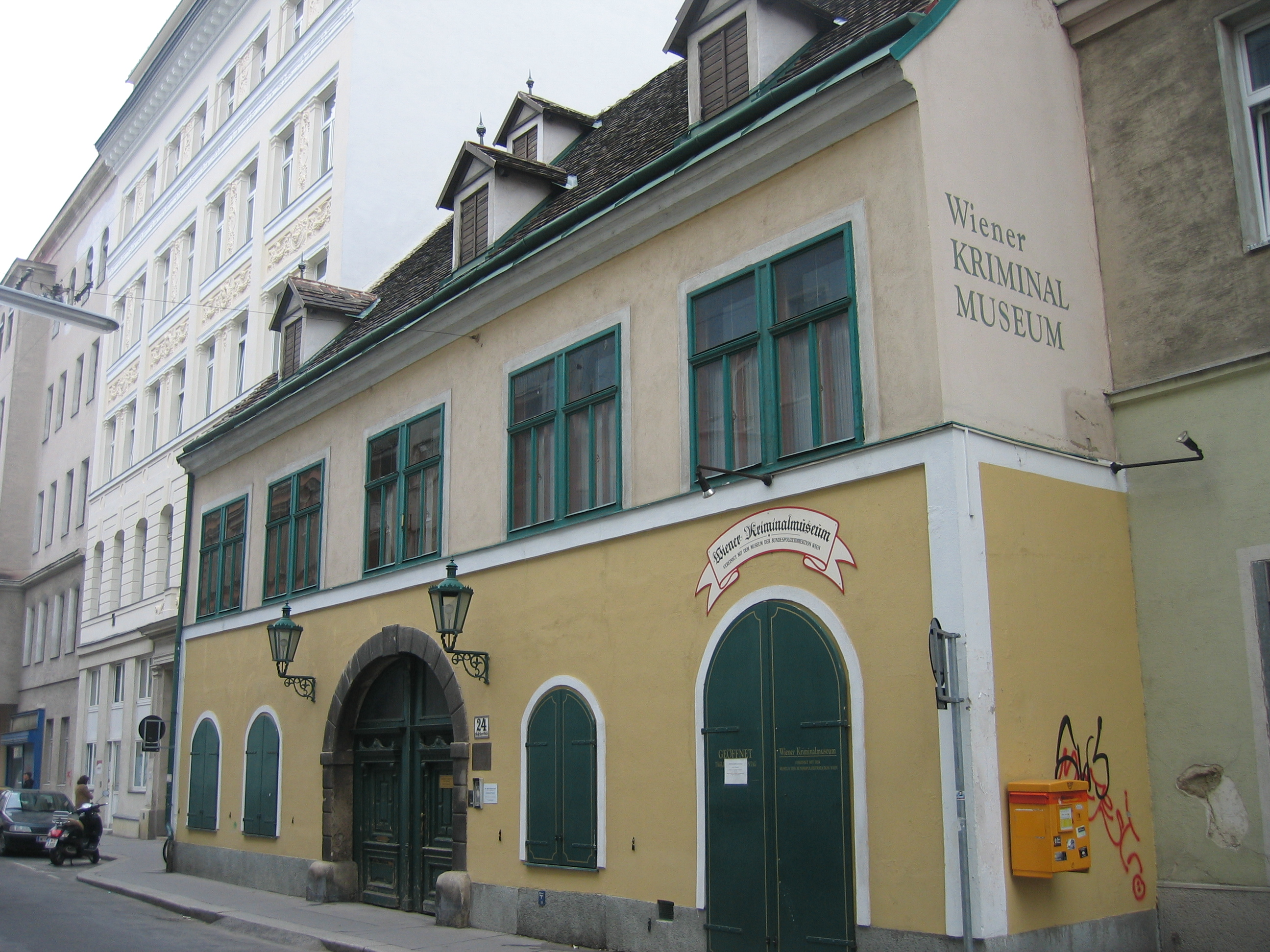 Das Gebäude des Wiener Kriminalmuseums in Wien